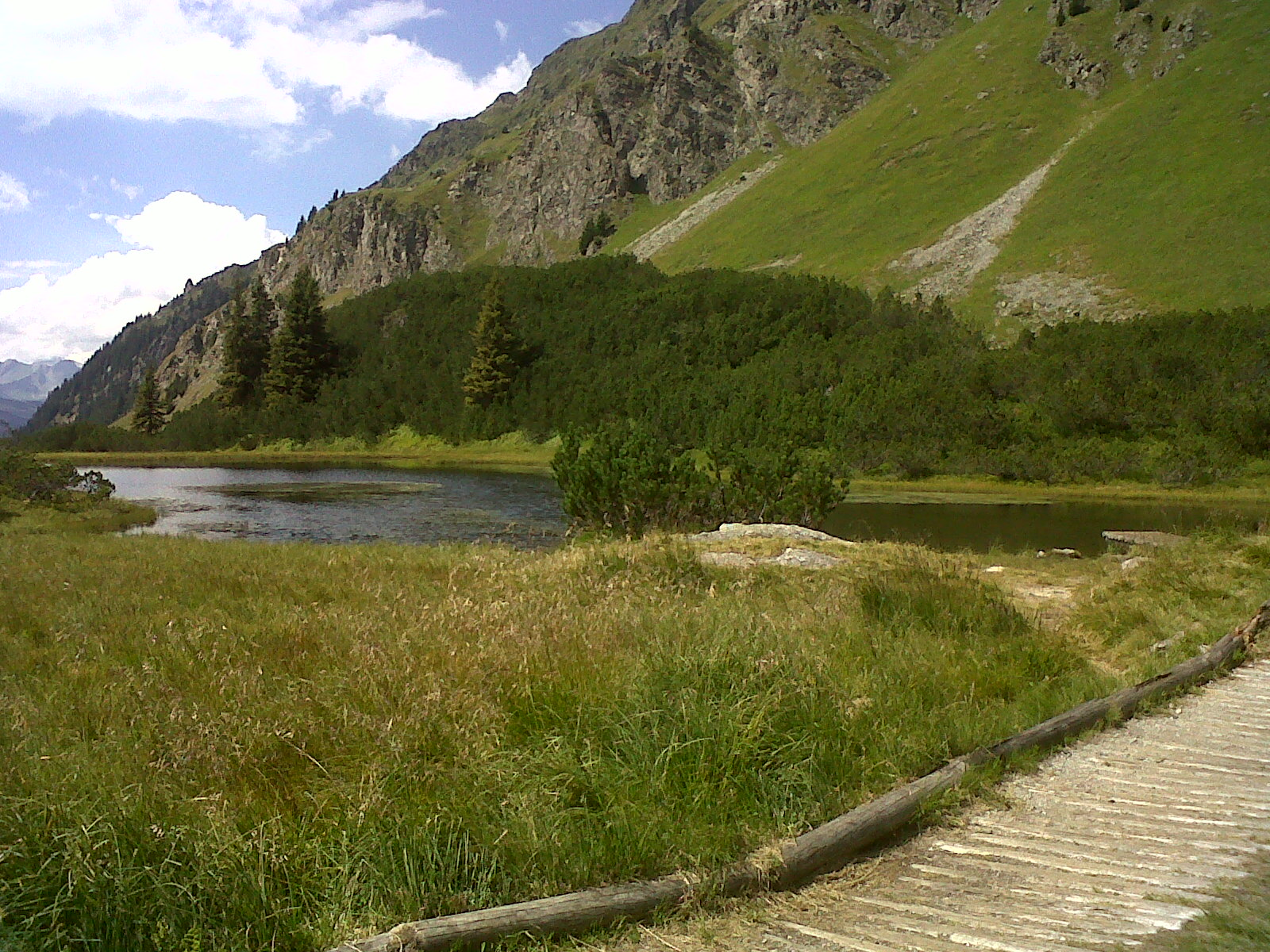 Österreich - Vorarlberg - Bezirk Bludenz - Gaschurn: Wiegensee